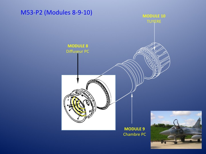 Modules constitutifs de la partie Post-Combustion et tuyère d'éjection du turboréacteur M53-P2